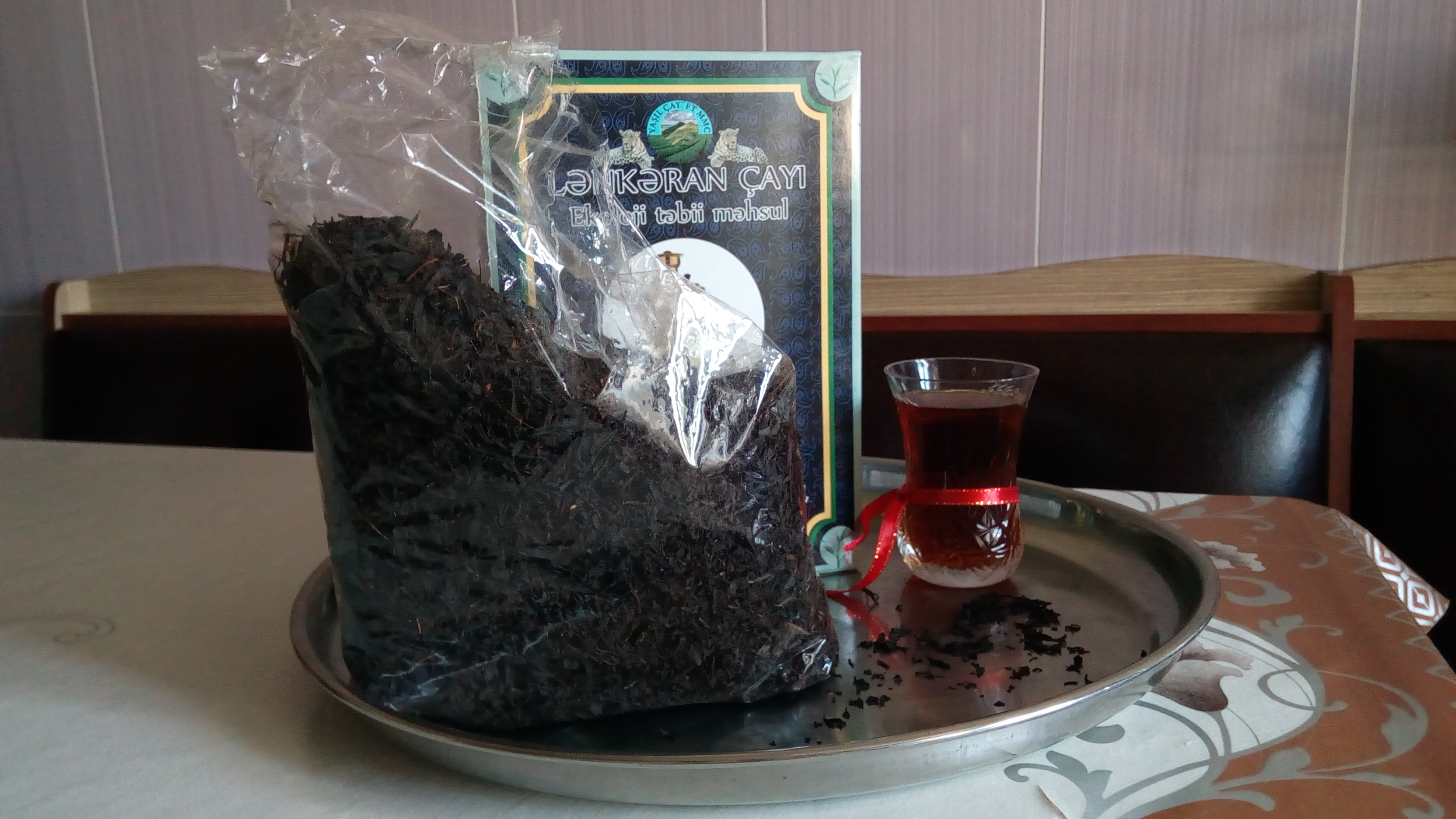 Lənkəran çayı